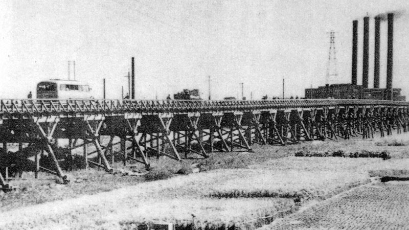 旧西新井橋から見た千住火力発電所の「お化け煙突」